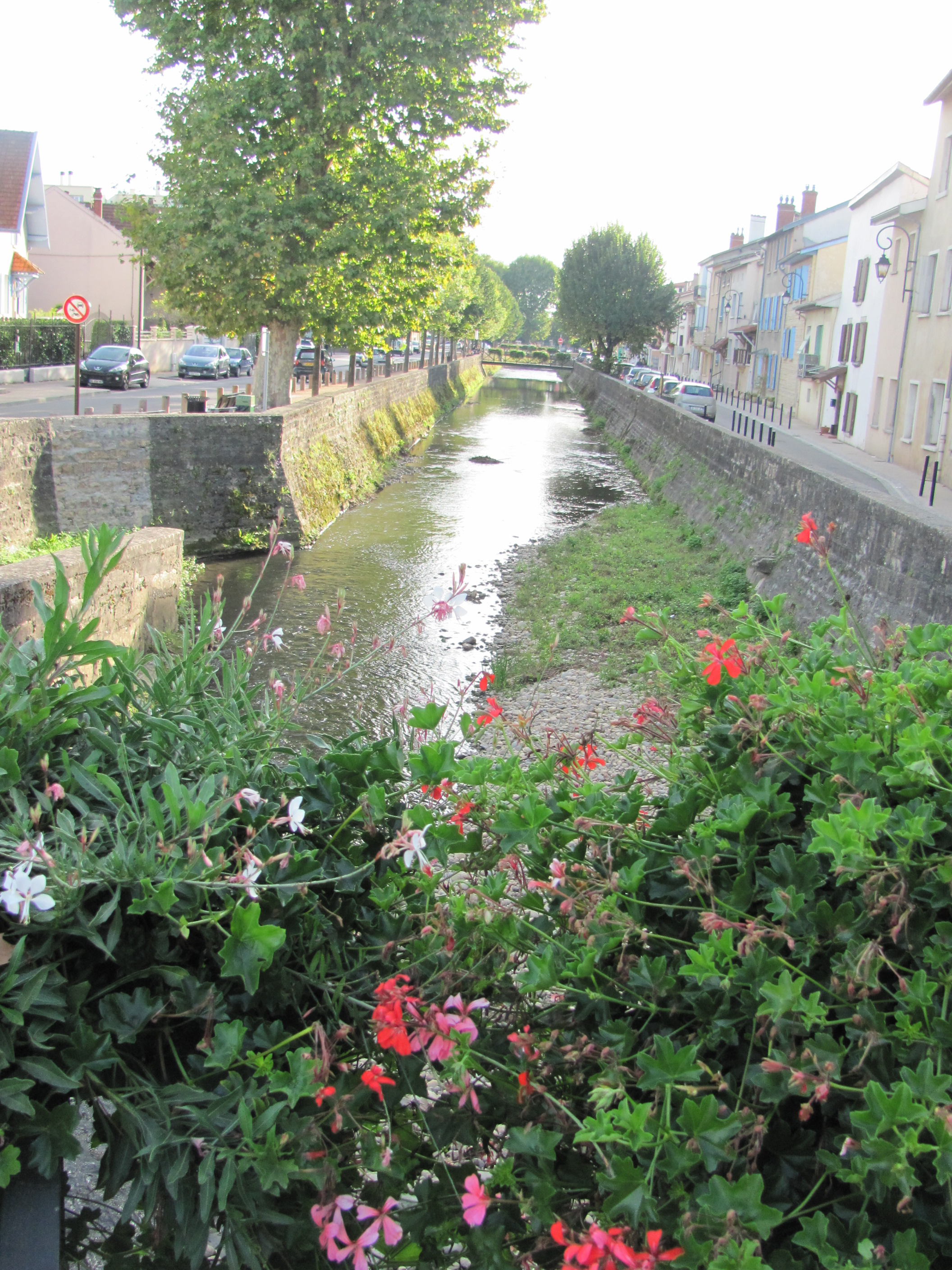 La Sereine à Montluel.